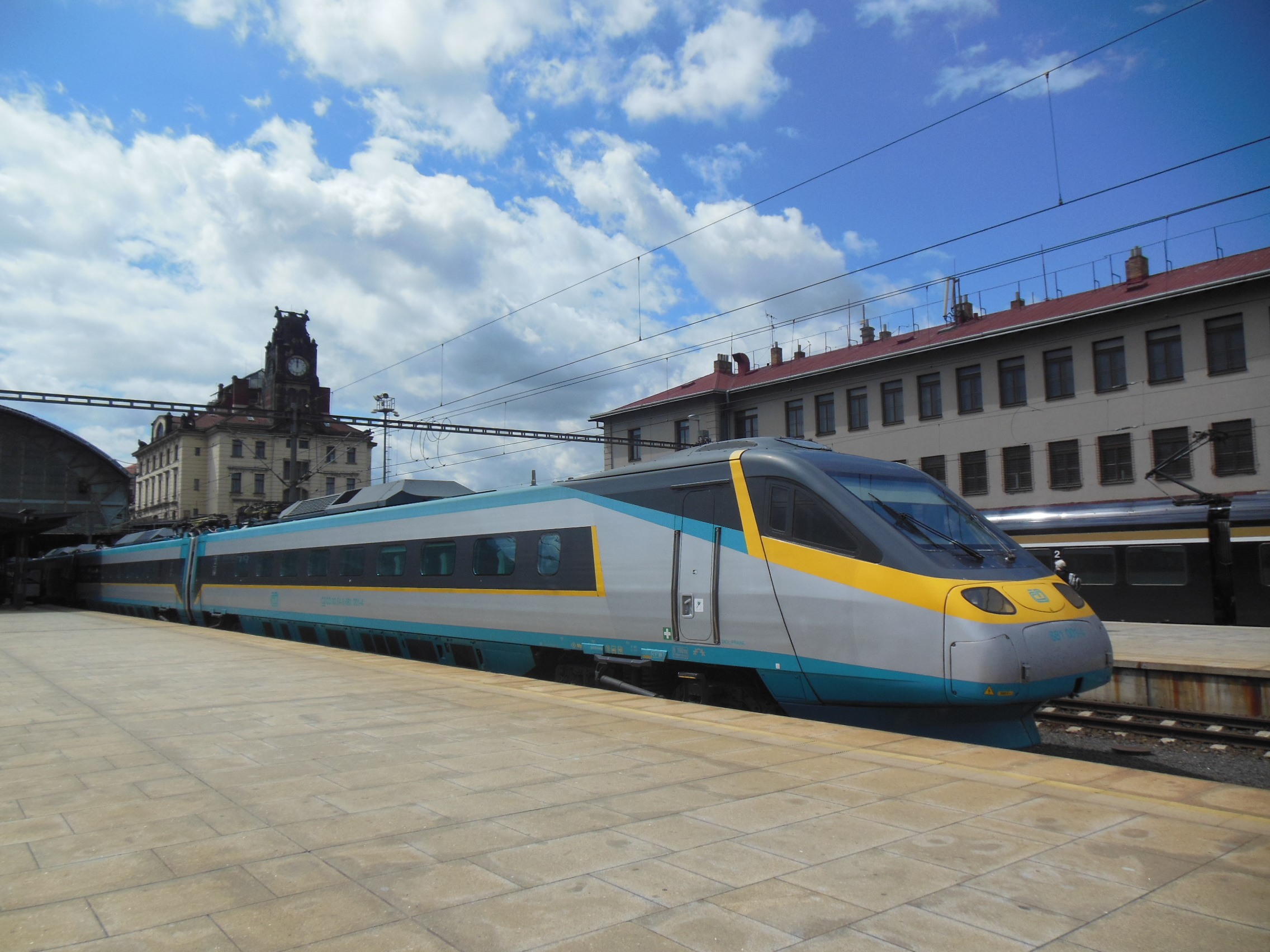 Praha-Vinohrady. Praha hlavní nádraží, elektrická jednotka 680 "Pendolino".